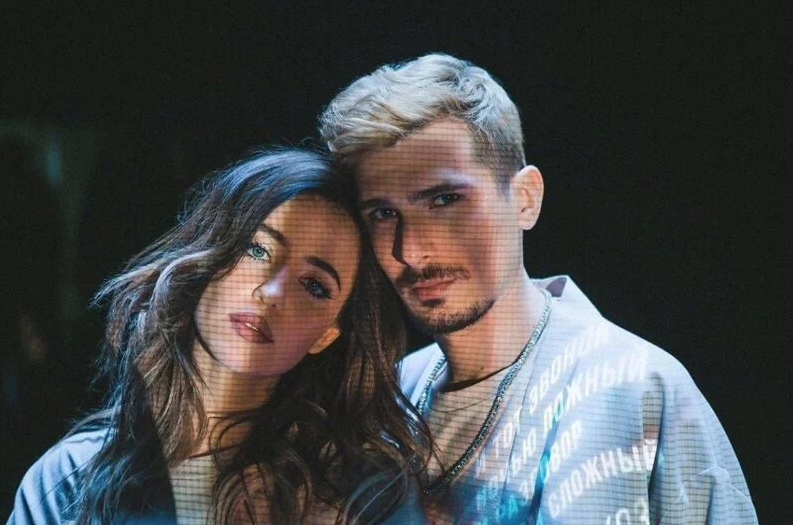 Время и Стекло 2020